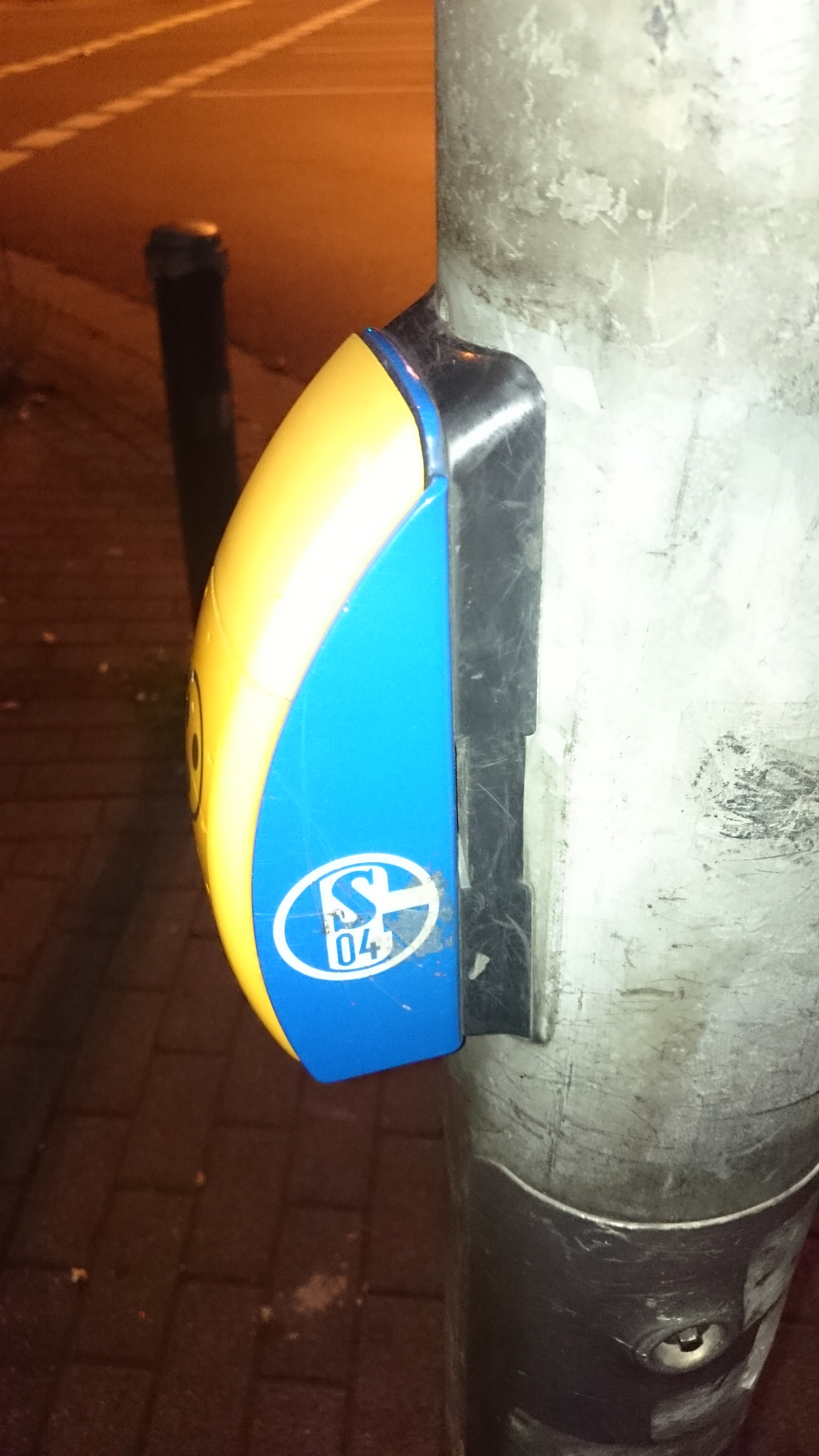 Wegen der ungünstigen Farbkombination Schwarz-Gelb macht ein S04-Logo alles wieder gut.